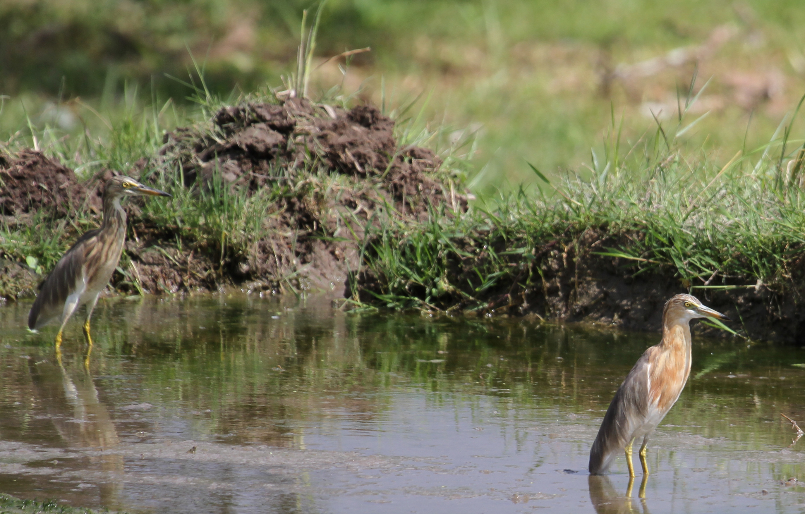 Crabier malais à Bali